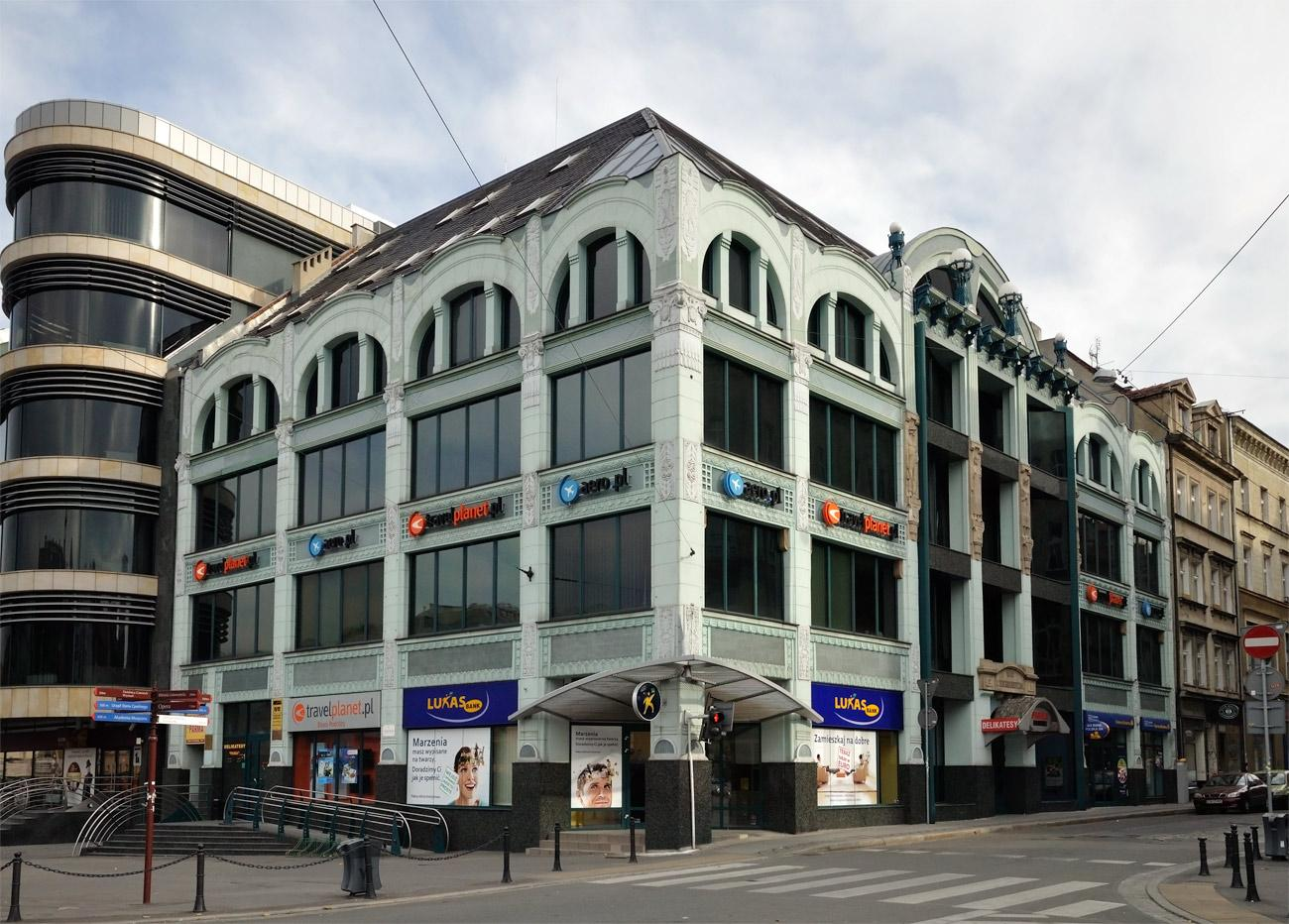 Dom handlowy na rogu ulicy Ruskiej i Białoskórniczej.